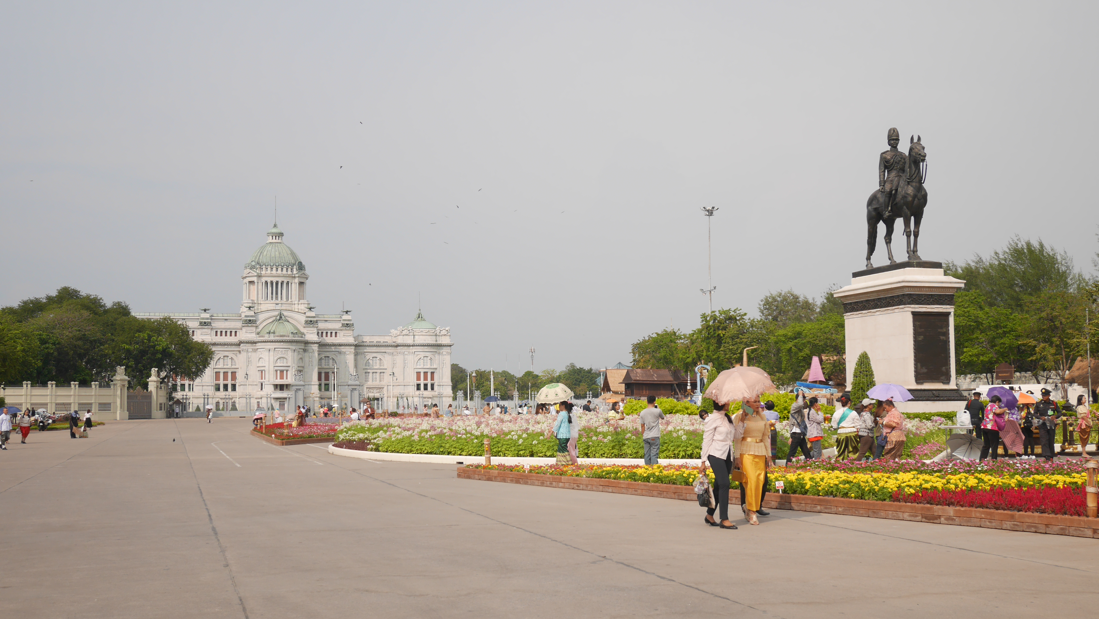 พระบรมราชานุสาวรีย์ พระบรมรูปทรงม้า